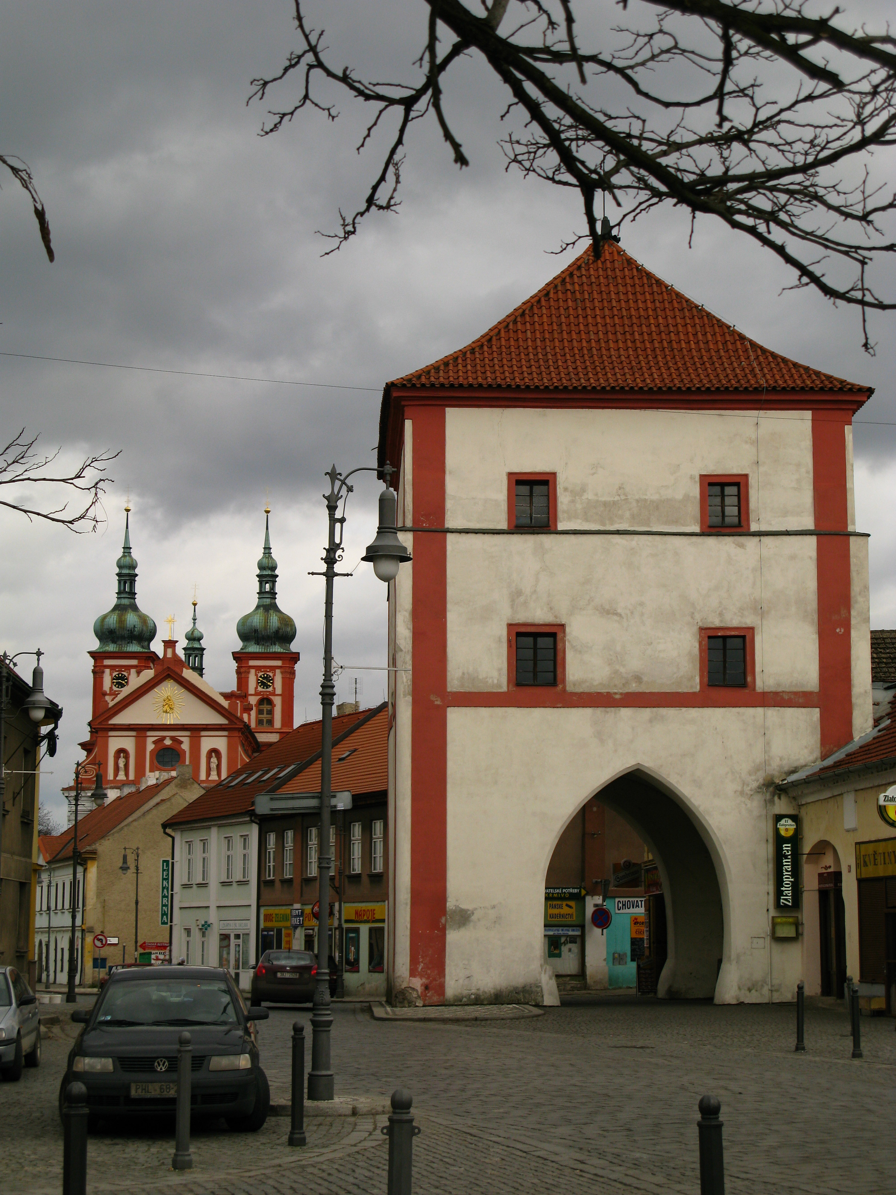 Stará Boleslav - Městská brana, v pozadí kostel Nanebevzetí P. Marie